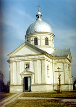 Церква у с. Суховоля: 1912 р., архітектор В. Нагірний (1848—1921)